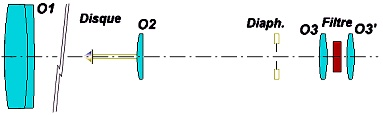 Shéma des composants optique d'un coronographe de Lyot (pour illustration article Coronographie) Licensing Catégorie:Schéma de physique